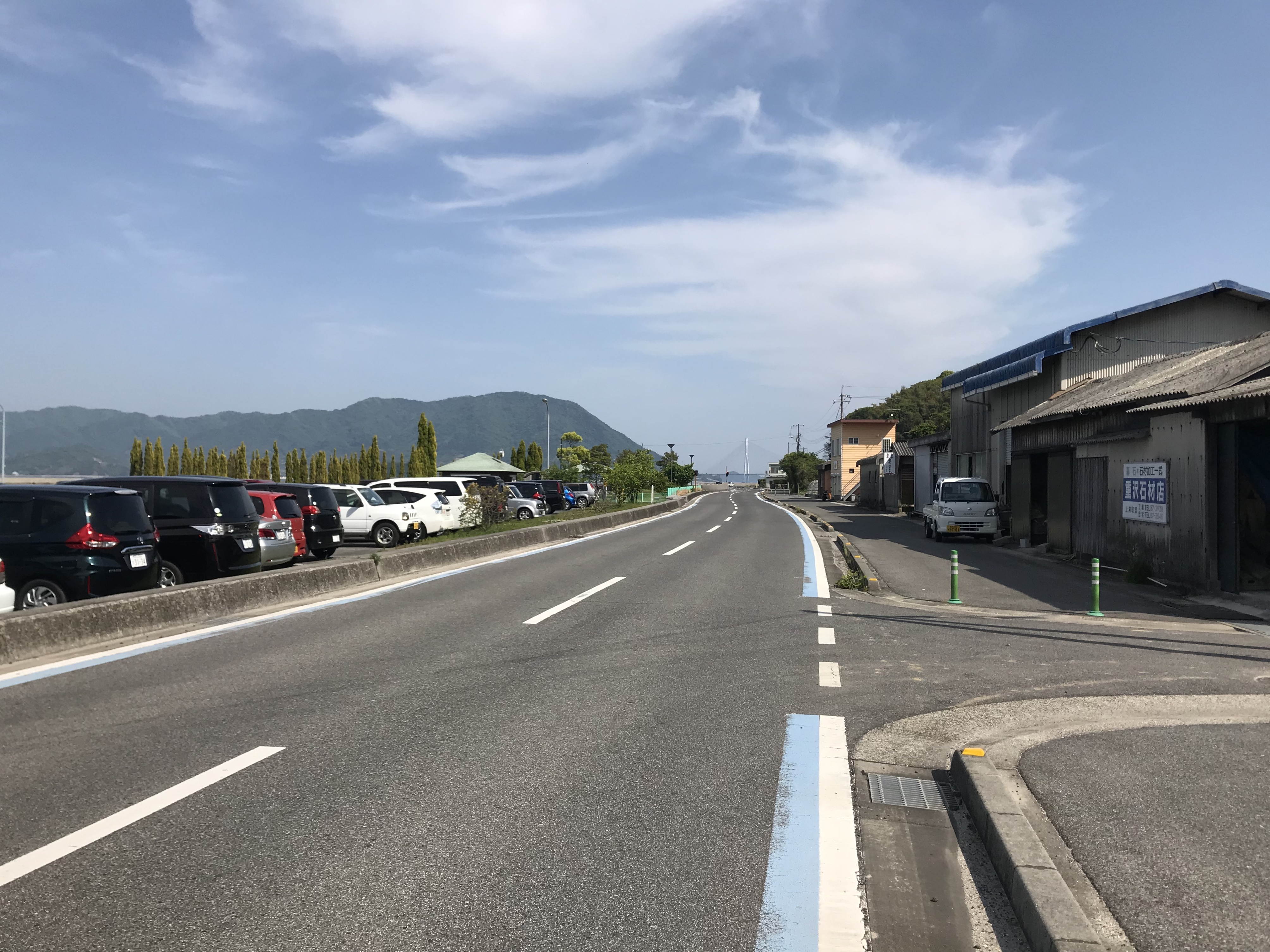 盛港付近の愛媛県道51号